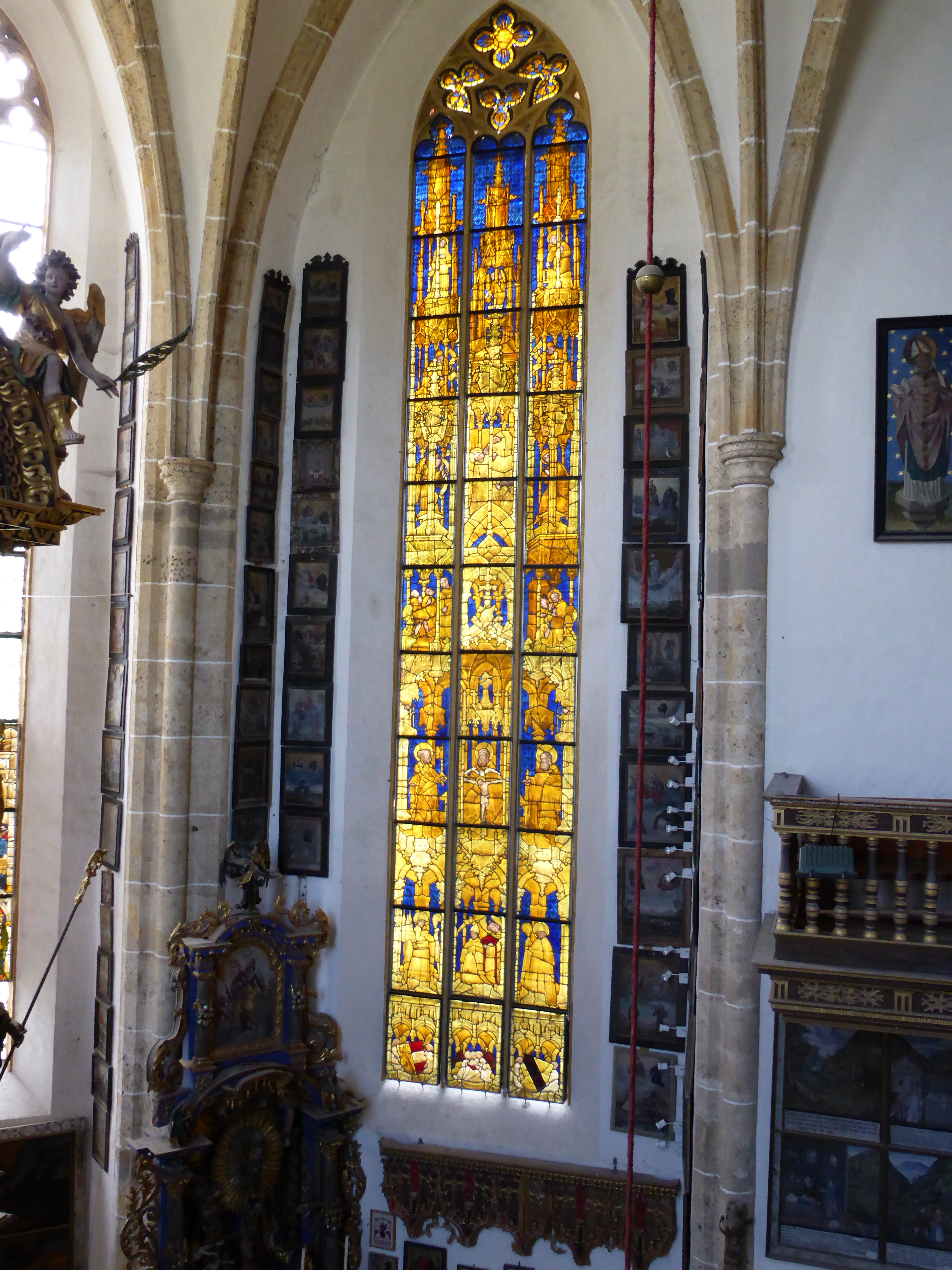 Goldenes Fenster, bis 1912 mittig im Achsfenster des Chores, seither südlich eingebaut. Gestiftet von Erzbischof Johann II. von Reisberg 1433, St. Leonhard ob Tamsweg